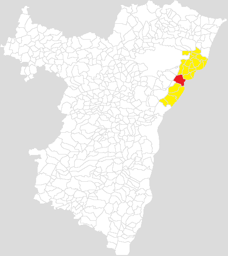 Communauté de communes pays rhénan